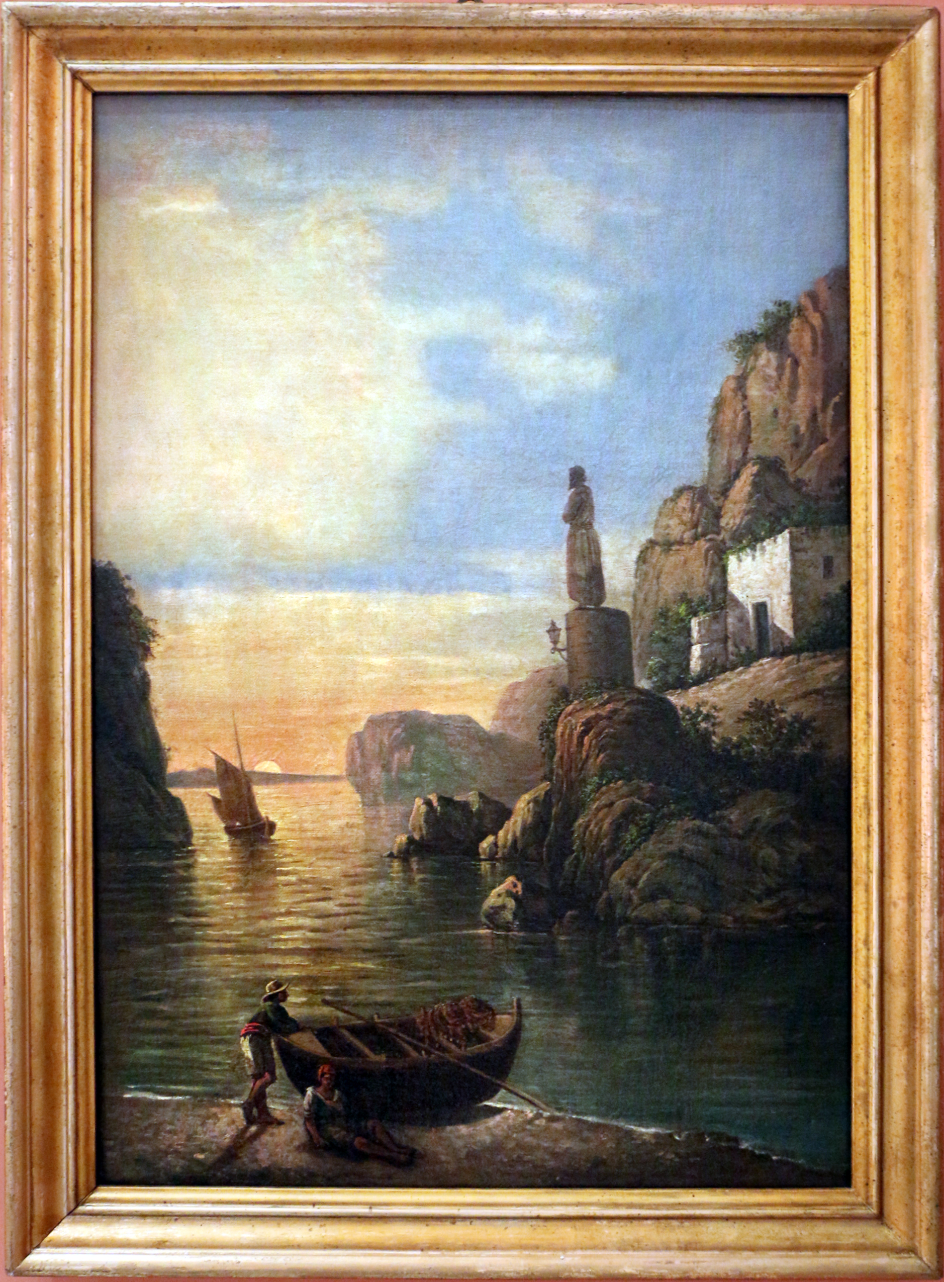 Pinacoteca civica di Reggio Calabria - paintings This is a photo of a monument which is part of cultural heritage of Italy.